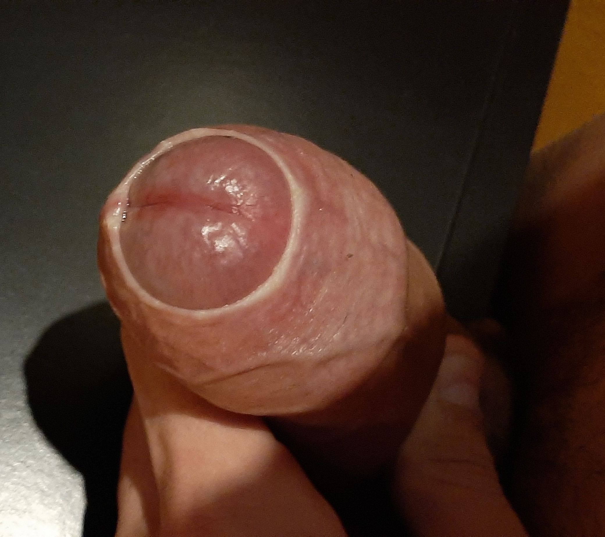 Nel file è rappresentata una fimosi non serrata che ha creato un anello bianco in cui la pelle si è irrigidita e ristretta. Solitamente in casi di fimosi non gravi come questa si prenota una visita per un eventuale circoncisione. Vi sono anche mezzi per intervenire ed eventualmente guarire la fimosi ma sono fortemente sconsigliati